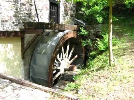 La roue du moulin de Kollig (die Kolliger Muehle)